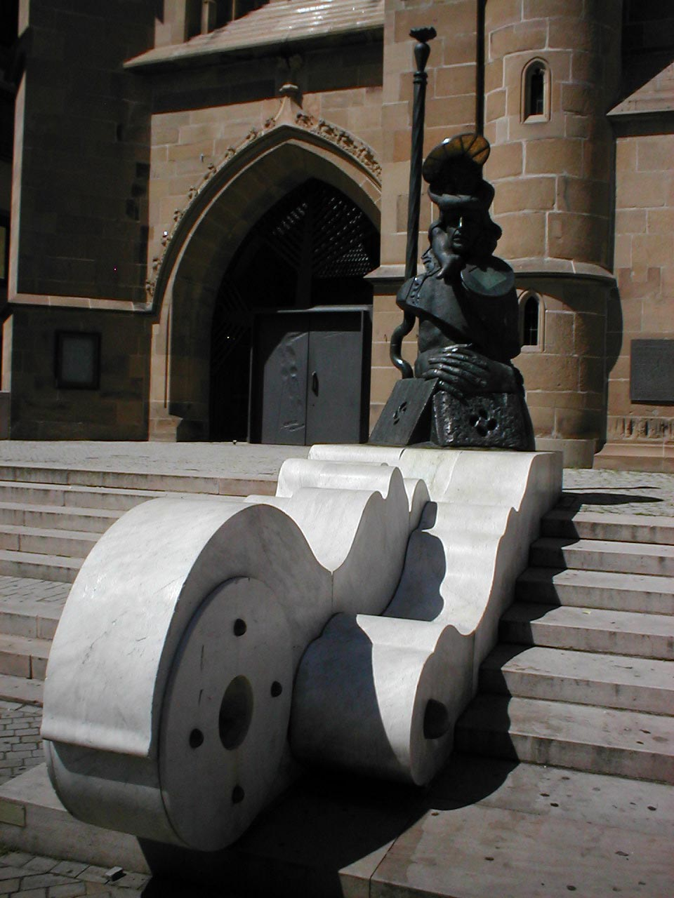 Skulptur Christophorus an der Kilianskirche Heilbronn